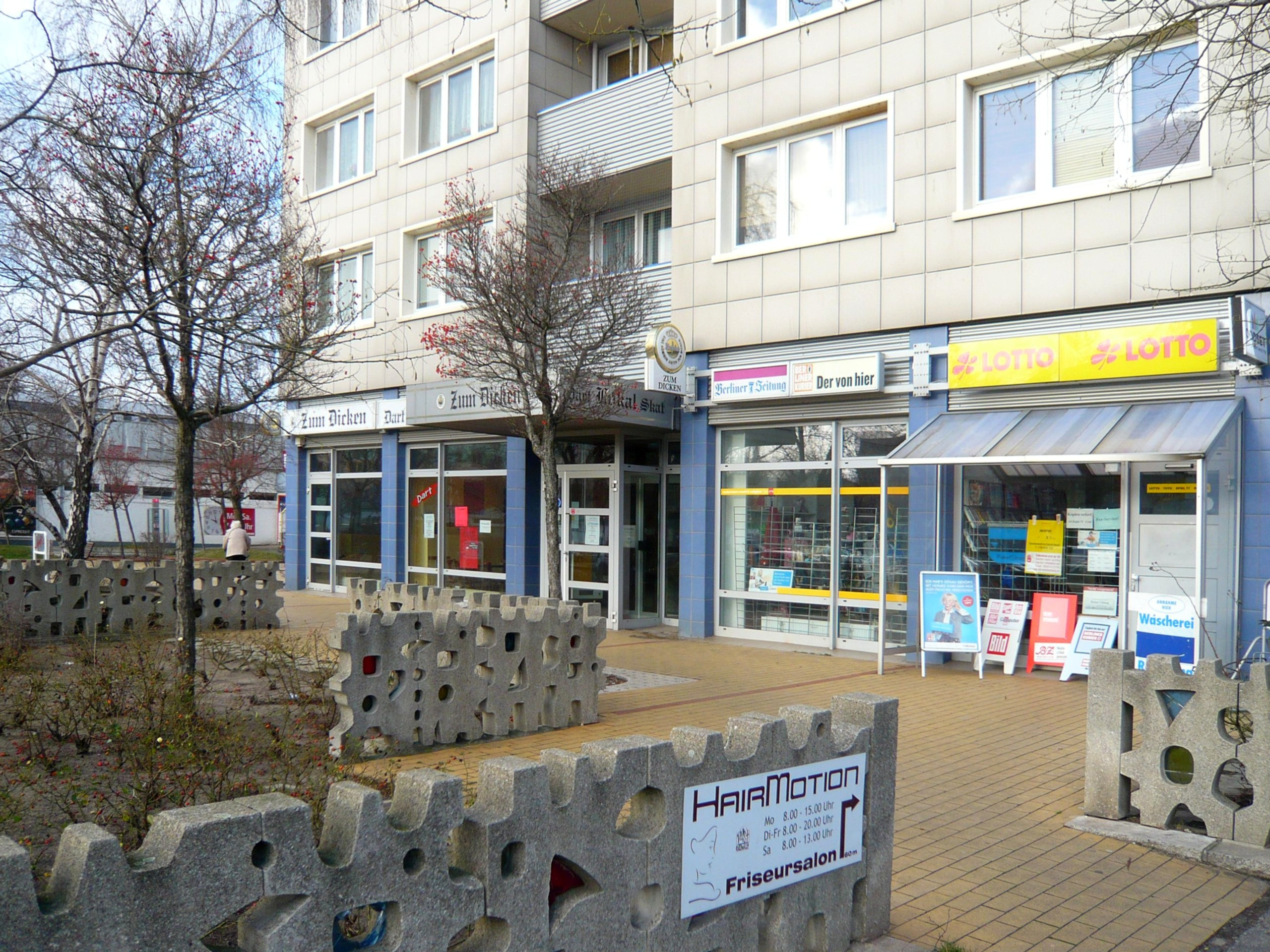 Bezirk Lichtenberg, Möllendorffstraße; Hochhaus Ecke Storkower mit Brunnen und Lokal